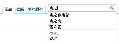 中文維基百科的自動完成功能，這是輸入「青之」的結果